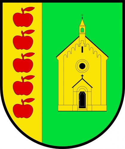 znak , Dolany, okres Náchod